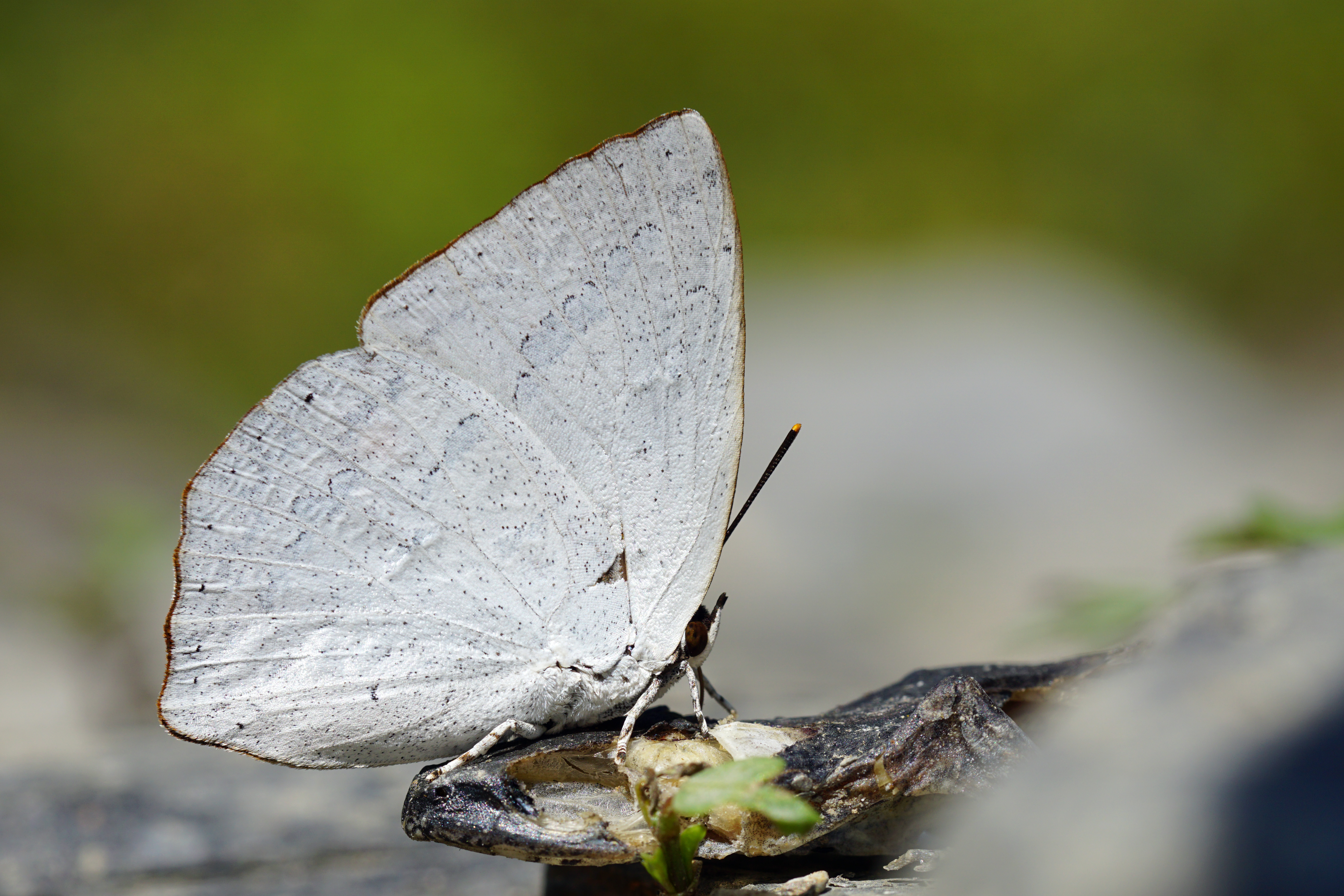 銀灰蝶 Curetis acuta formosana